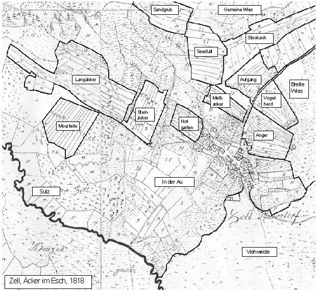 Das Esch von Zell (Ostallgäu); Ausschnitt aus den Karten SW XXV 32, SW XXVI 32 und SW XXVI 33